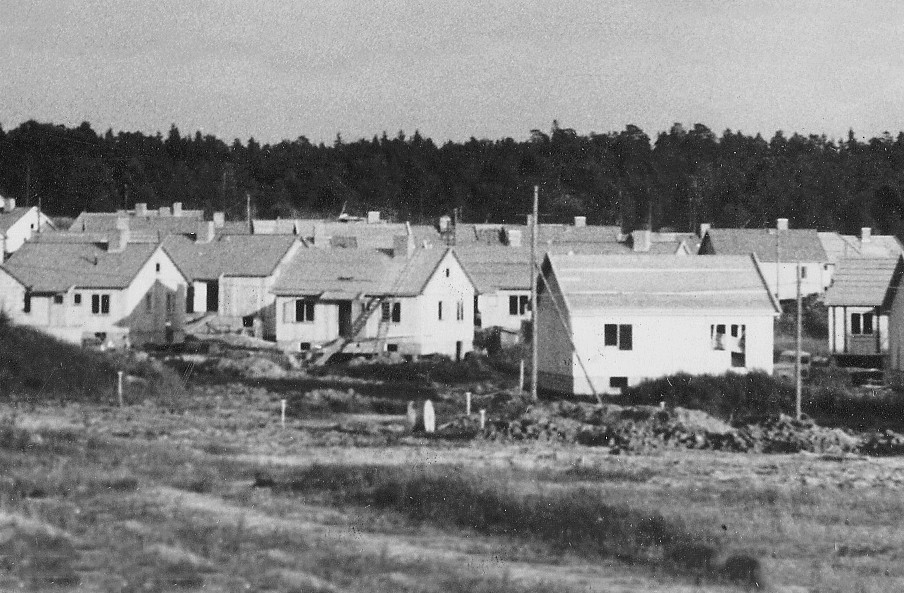 Småstugor i Sköndal under uppförande